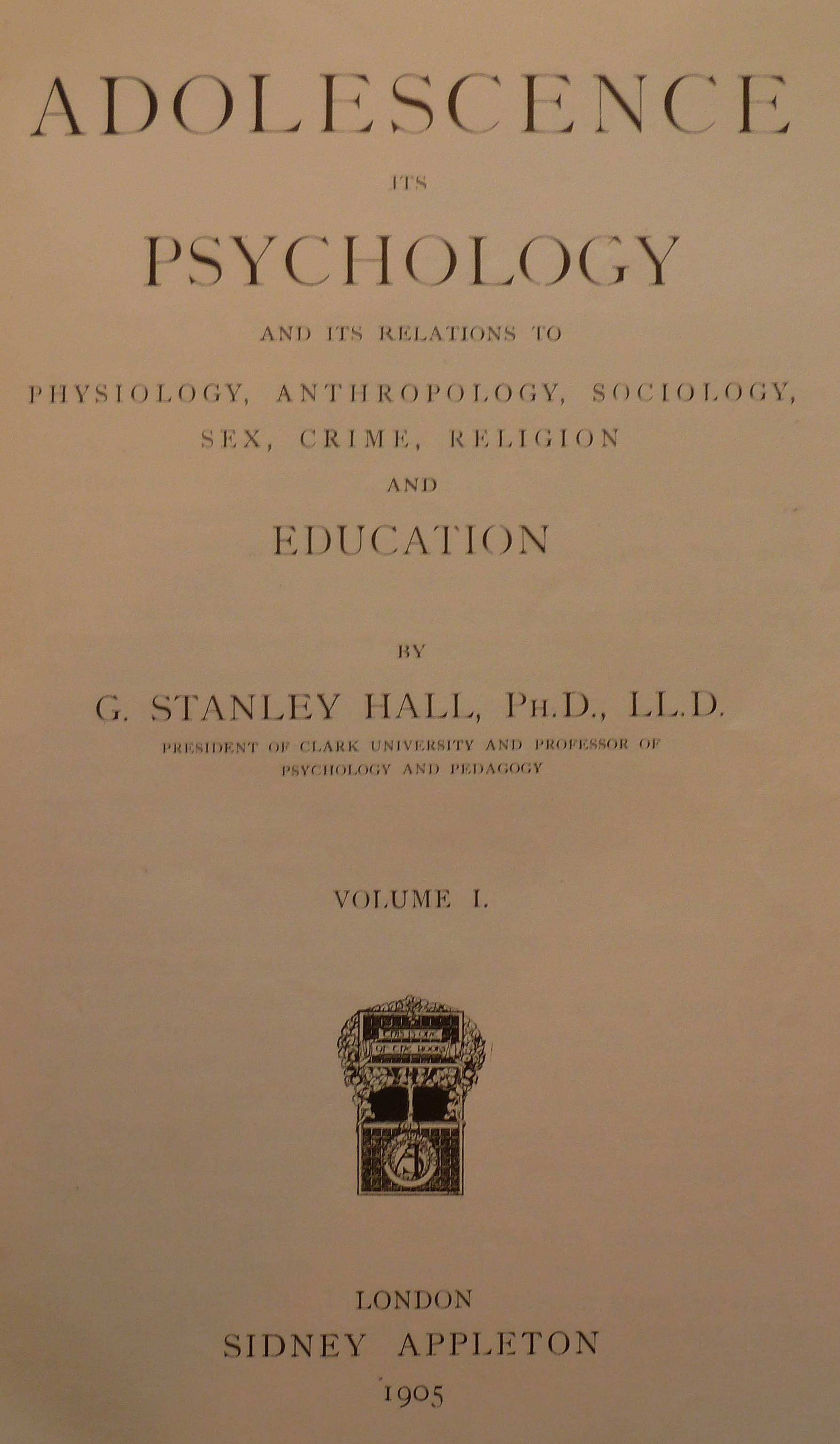 Fra første utgivelse av Halls 2 bind i England i 1905. Boka kom ut året før i USA